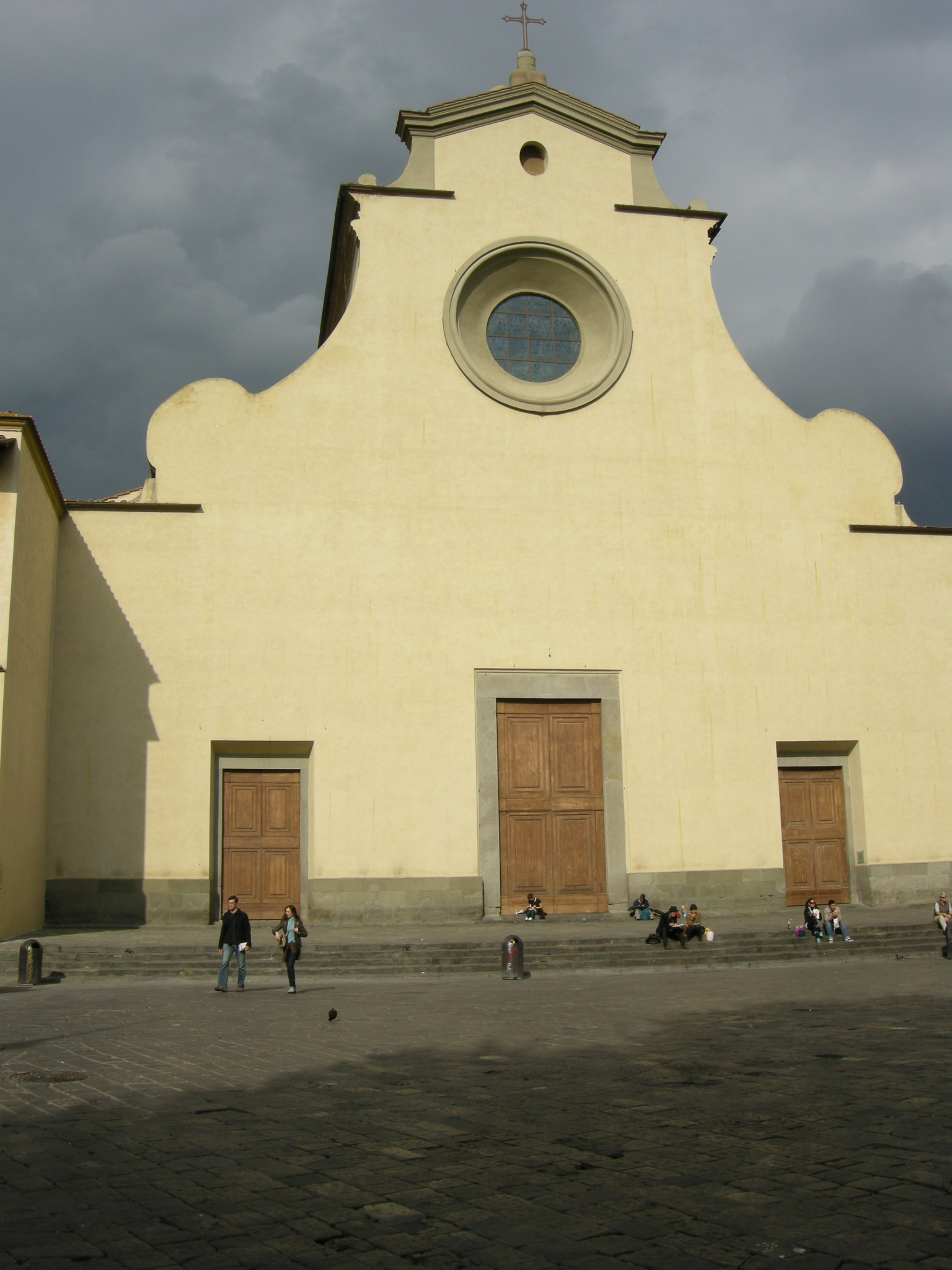 Facciata di santo spirito